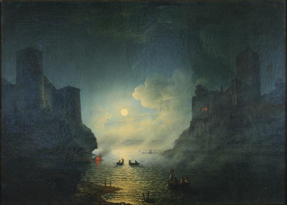 А. Волосков. Вид Выборга с моря ночью. 1847